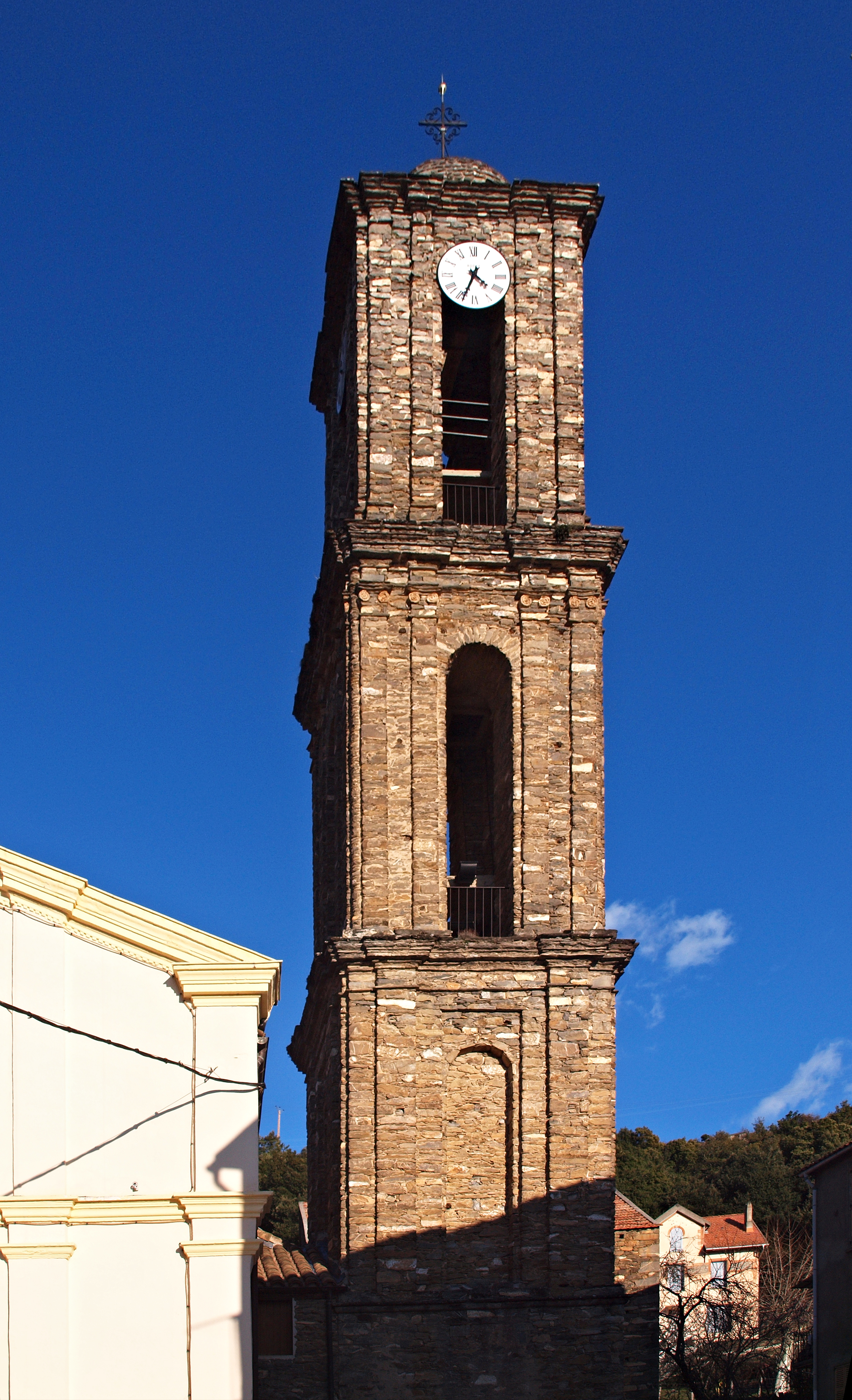 Erbajolo, Bozio (Haute-Corse) - Clocher de l'église Santa Maria Assunta